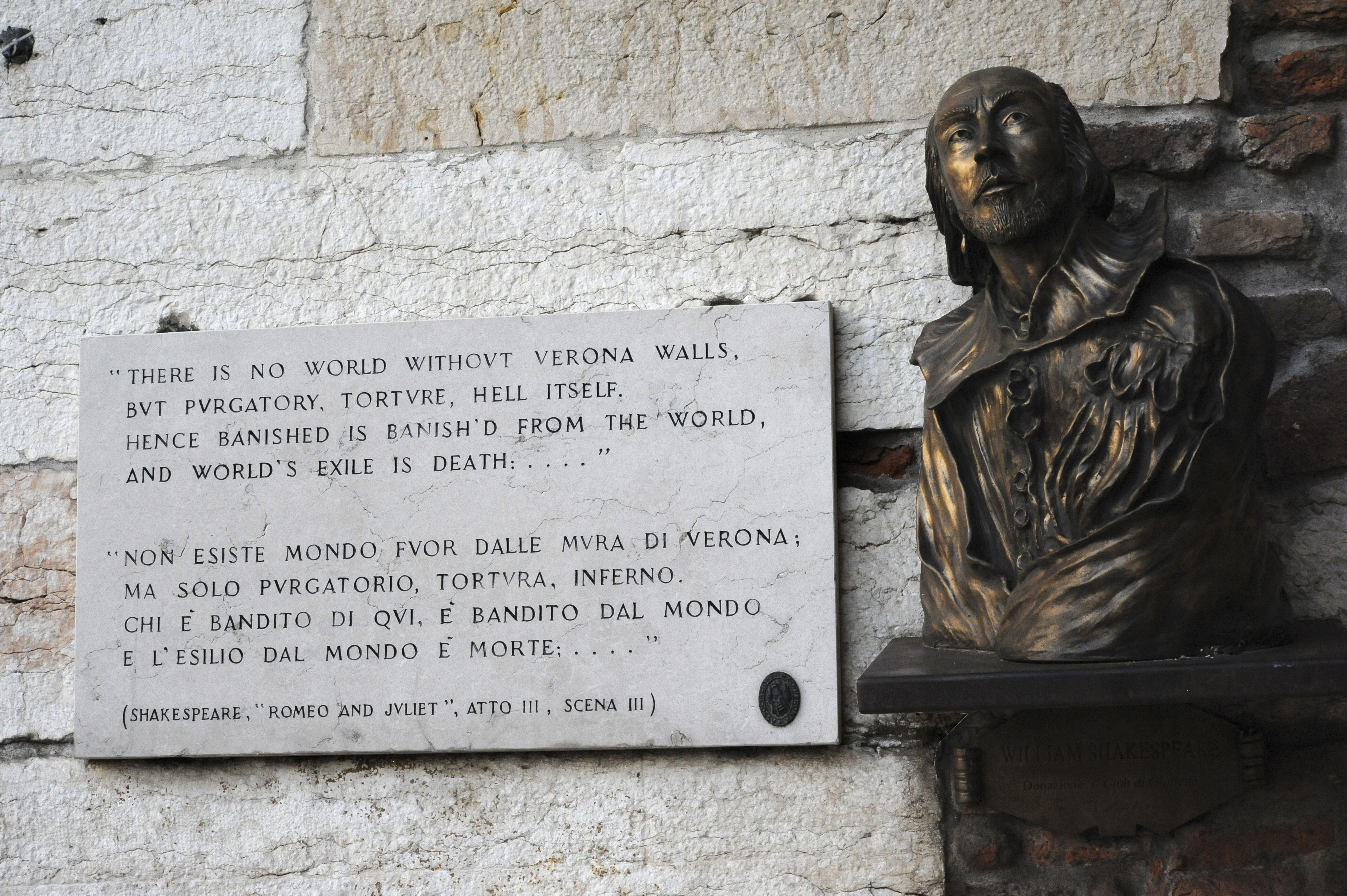 Verona Gates